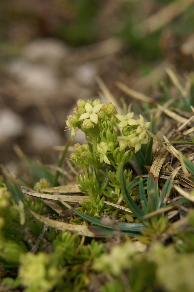 Raznolistna lakota na Kepi.